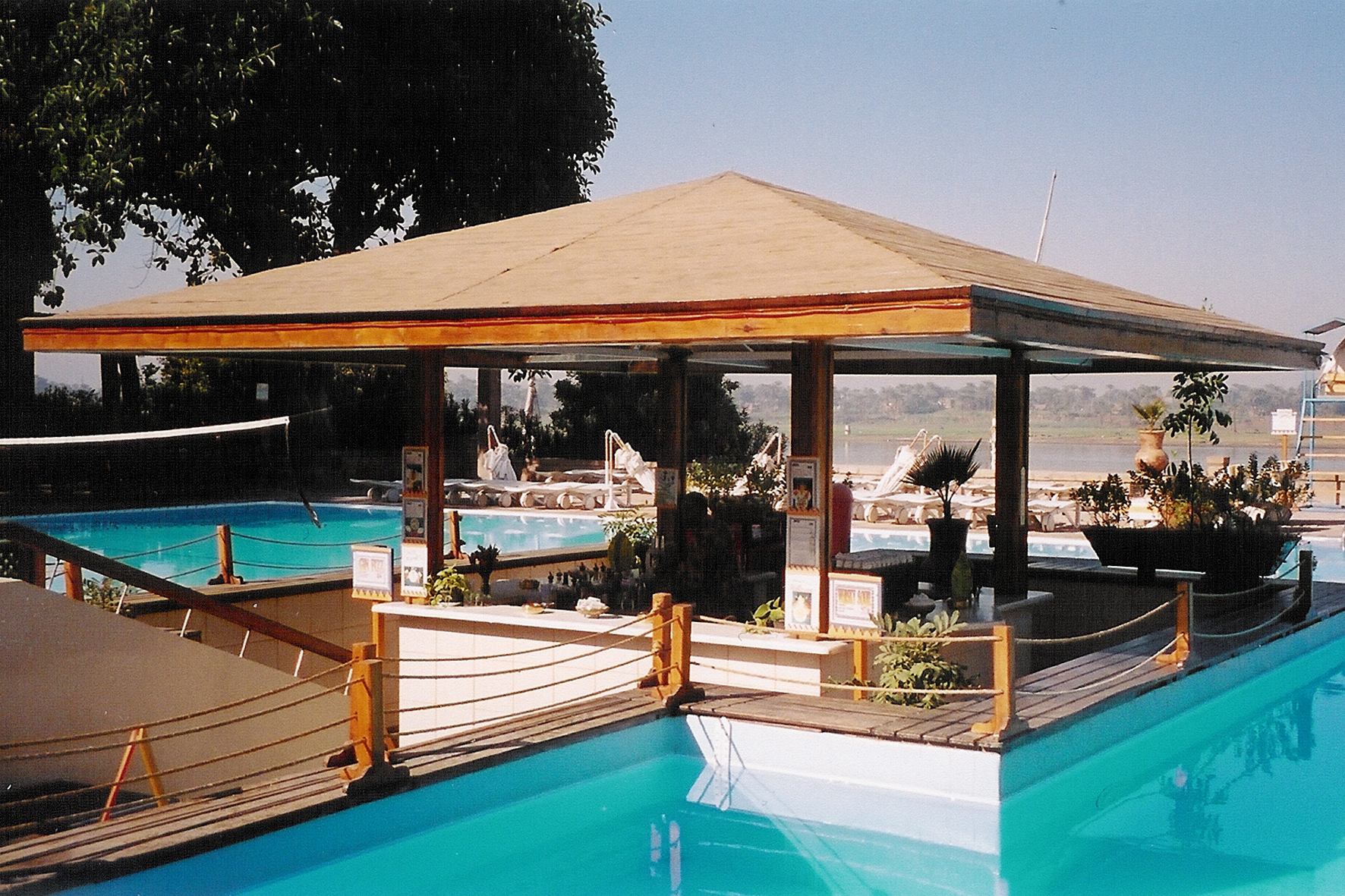 Bar et piscine du Club Med de Louxor en Égypte